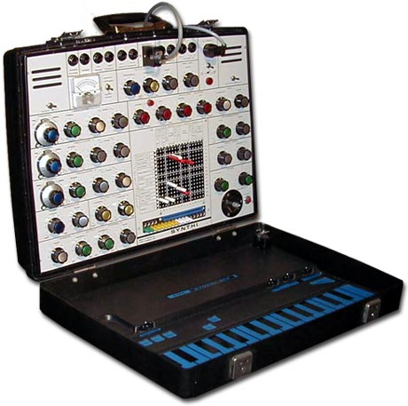 Sintetizzatore EMS Synthi AKS Licensing Categoria:Sintetizzatori Categoria:Sintetizzatori EMS